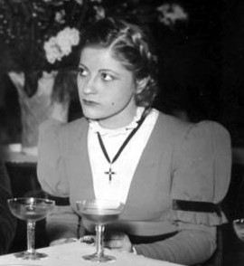 Title: Gastspiel des Berliner Schiller-Theaters im besetzten Frankreich People in the image: Uhlen, Gisela: Schauspielerin, DDR Factual corrections and alternative descriptions are encouraged separately from the original description. Additionally errors can be reported at this page to inform the Bundesarchiv. Original historic description: ADN-ZB Gastspiel des Berliner Schiller-Theaters im besetzten Frankreich In dem von deutschen Faschisten besetzten Paris gab das Berliner Schiller-Theater im Januar/Februar 1941, im Theatre des Champs Elysees u.a. ein Gastspiel mit Schillers "Kabale und Liebe". 2655-41